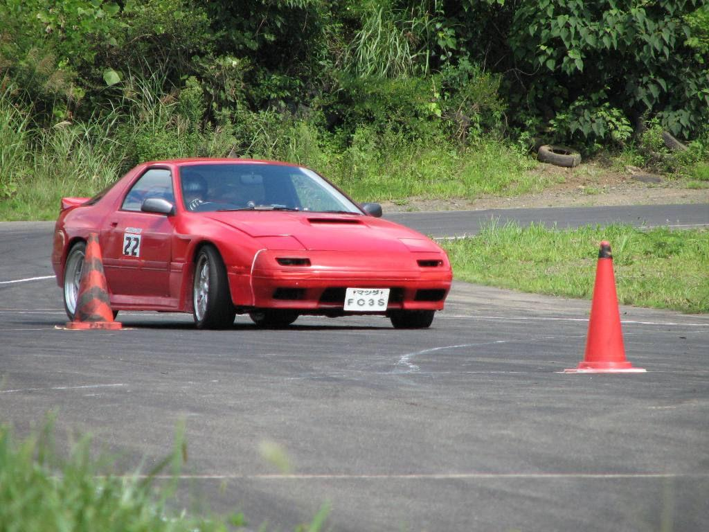 Mazda RX-7 (FC3S) on a autocross.